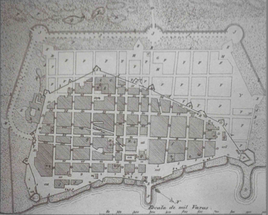 Álbum de Ignacio Triguero, Ma. Teresa Bermudez